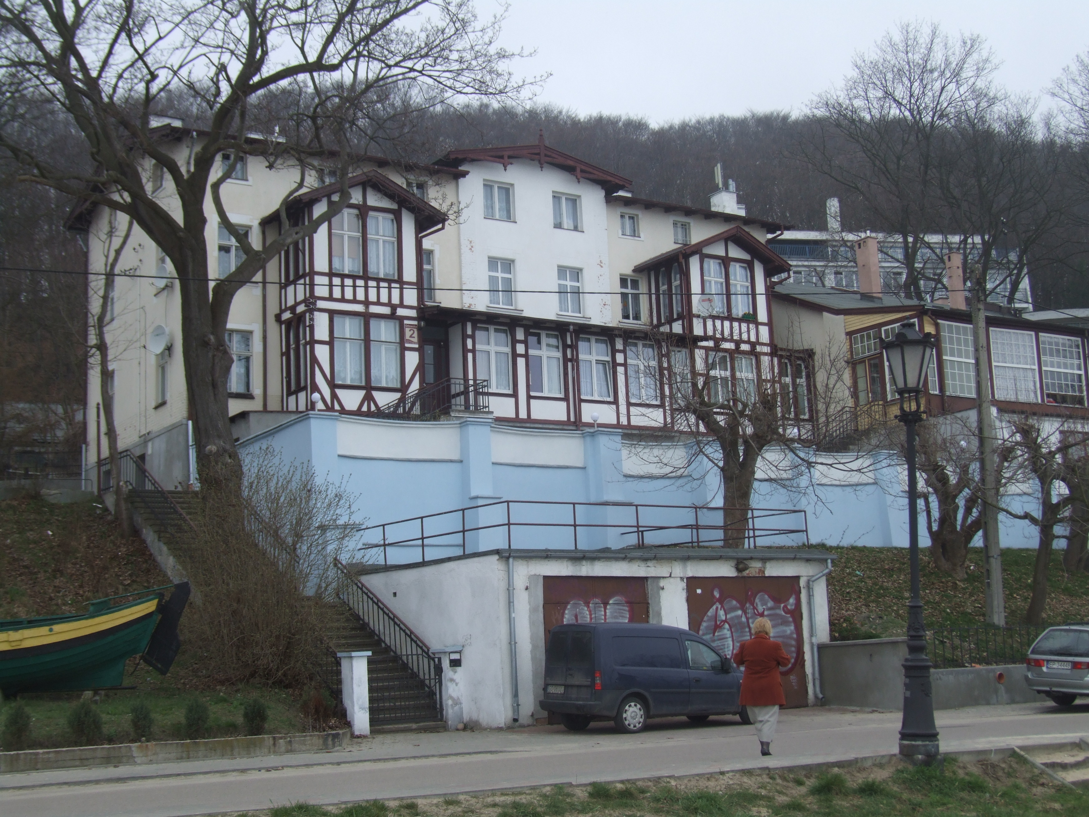 Dom kuracyjny w Gdyni Orłowie, ulica Orłowska 2